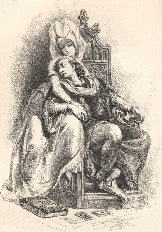 Charles VI et Odinette, gravure issue de l'ouvrage Histoire de France.